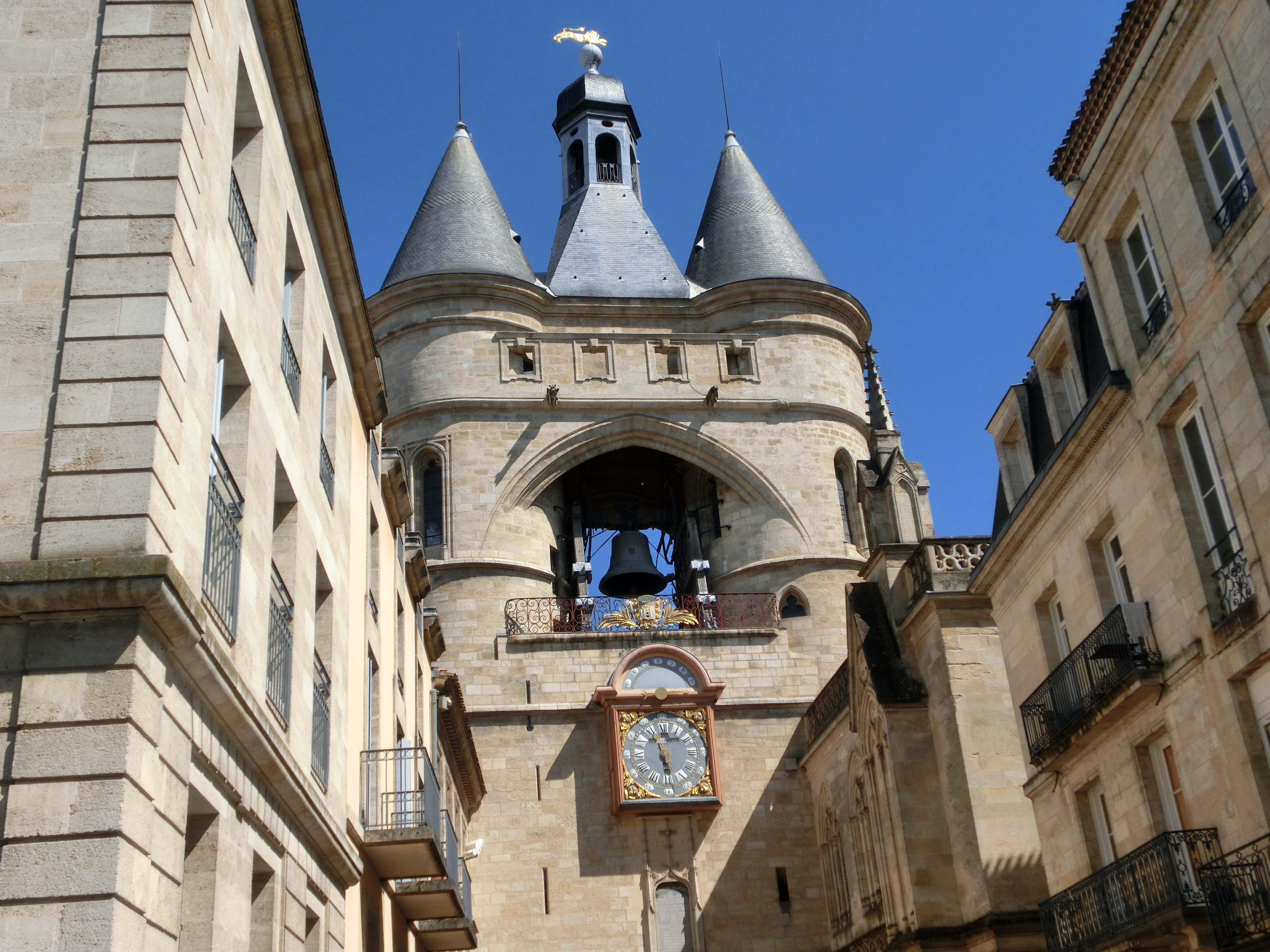 Porte Saint-Eloi de Bordeaux.